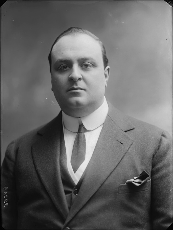 Cesare Formichi